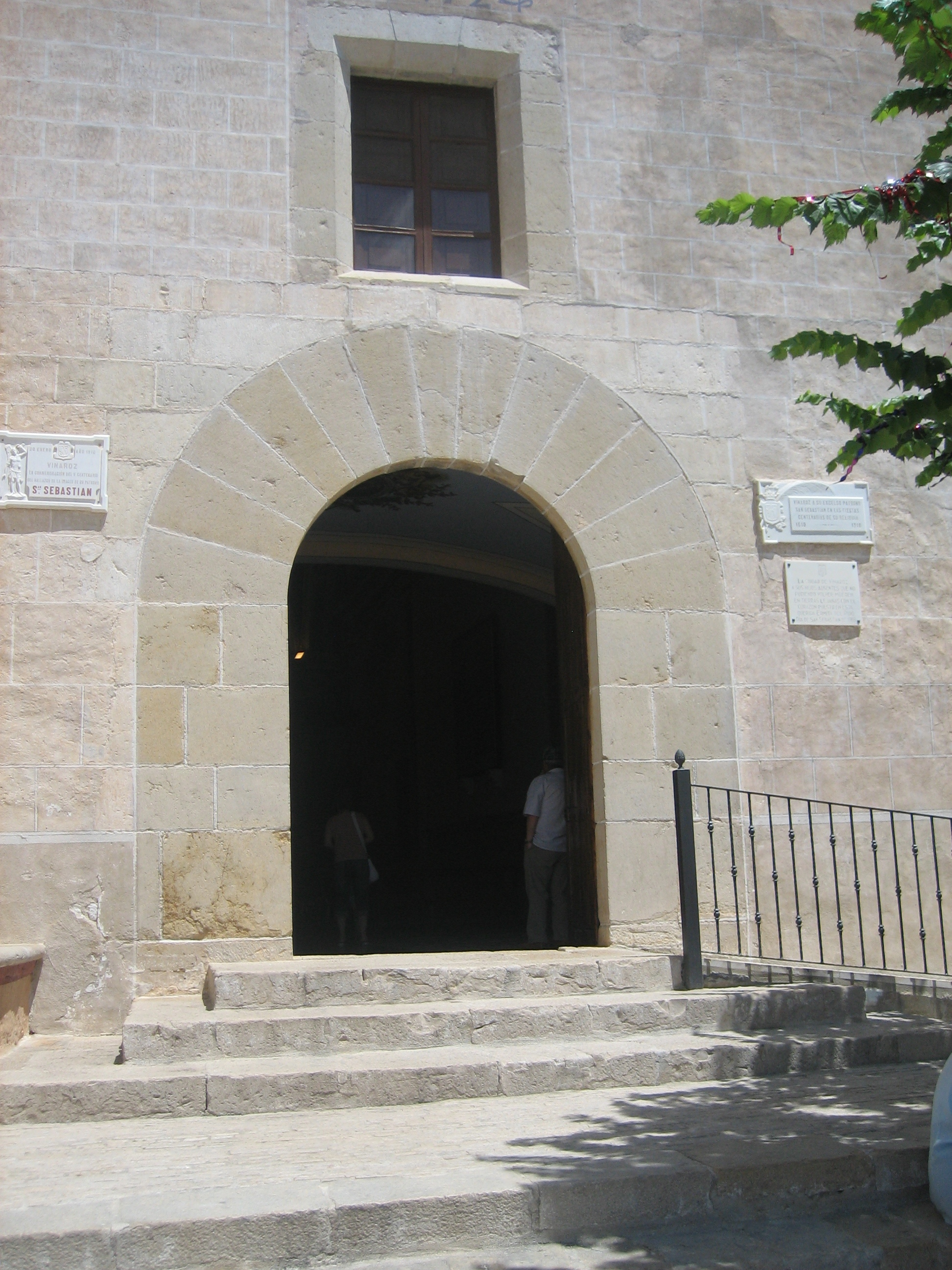 Portada de l'ermita de la Mare de Déu de la Misericòrdia i de Sant Sebastià de Vinaròs (Baix Maestrat)